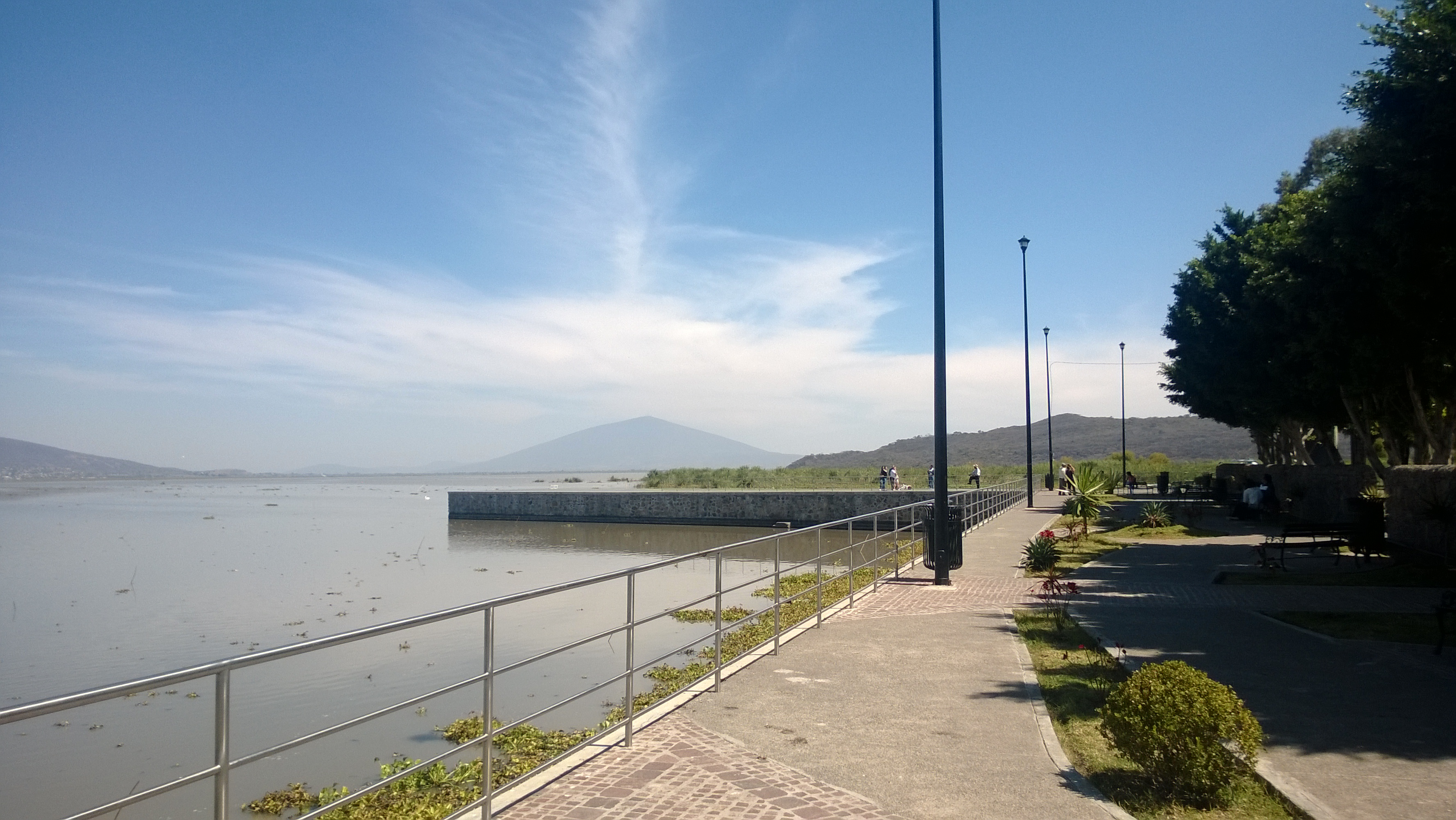 Imagen de la laguna y malecon de Yuriria, Guanajuato, México